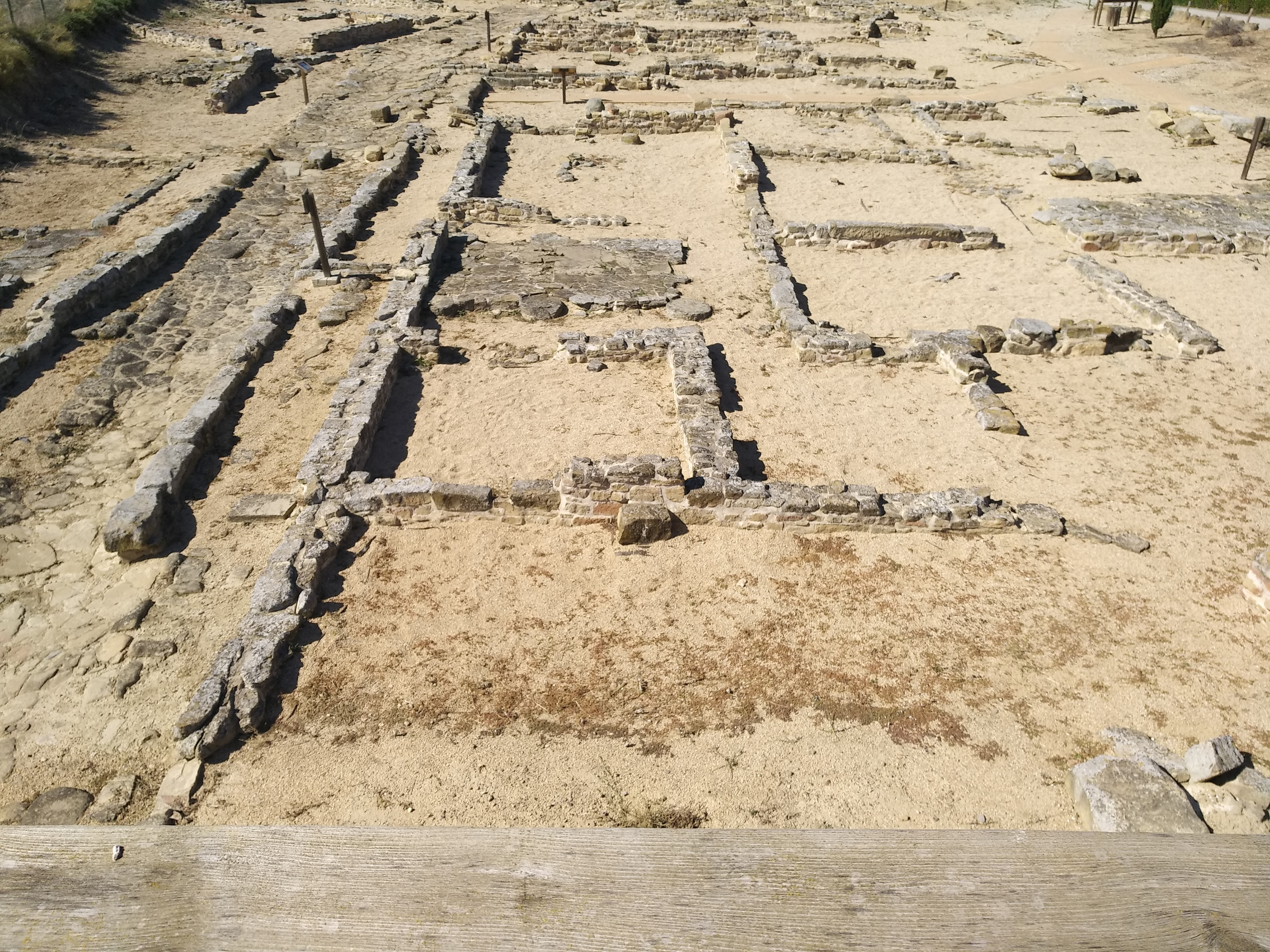 Vista aerea del conjunto